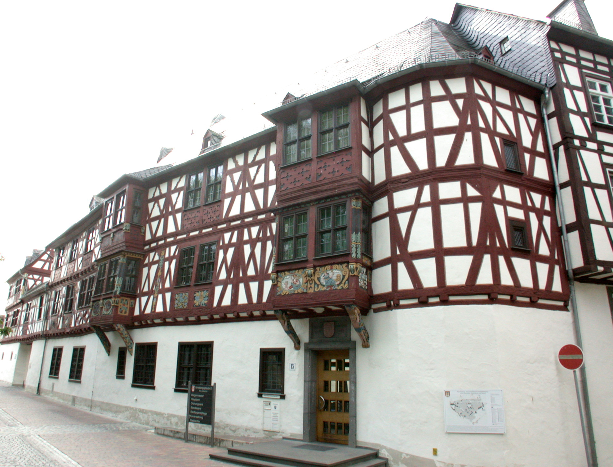 Amthof, Bad Camberg, Deutschland, Südwestassade